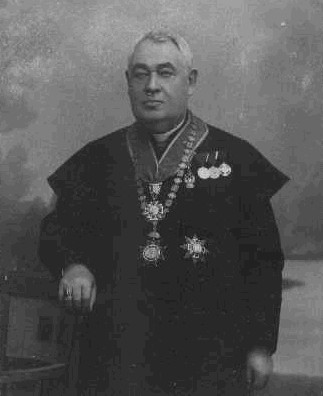 Josef Tittel (1849 - 1929), Český kněz, církevní historik.